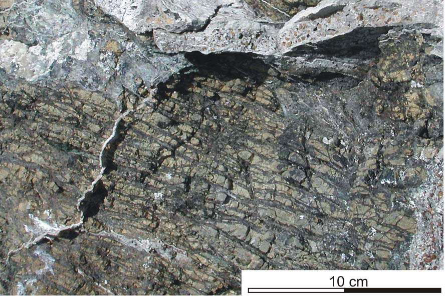 Mapa de localização